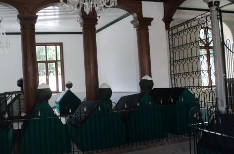 Merkez Efendi Türbesi-Zeytinburnu